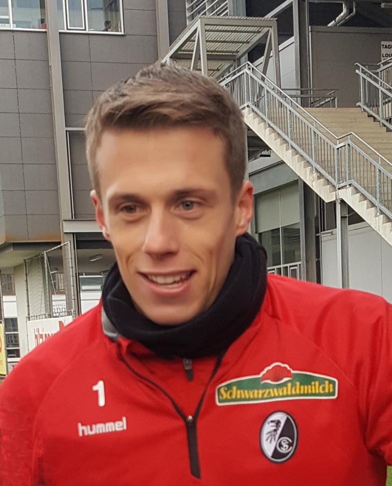 Alexander Schwolow nach dem SC Freiburg-Training am 4. Januar 2019